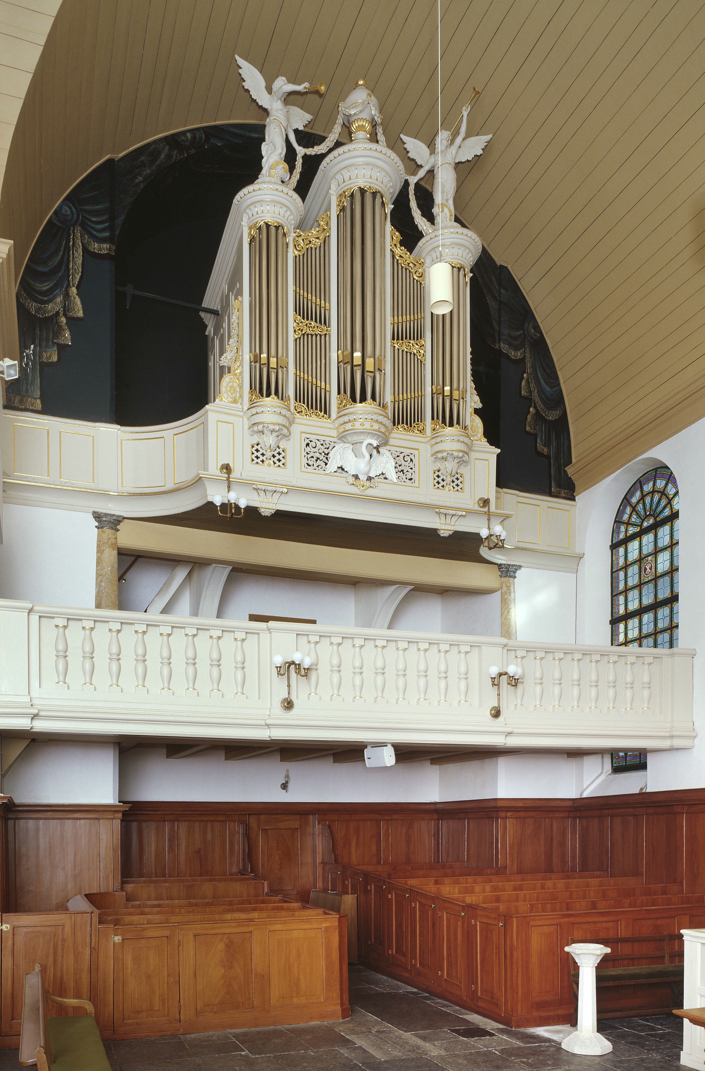 Evangelisch Lutherse Kerk: Interieur, aanzicht orgel, orgelnummer 1518 (opmerking: Gefotografeerd voor Het Historische Orgel in Nederland 1878-1886, Bladzijde 135)